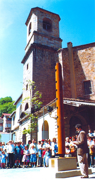 Joan Ignazio Iztuetaren omenez Zaldibian jarritako "La vertical del sonido" Ricardo Ugarteren eskultura.